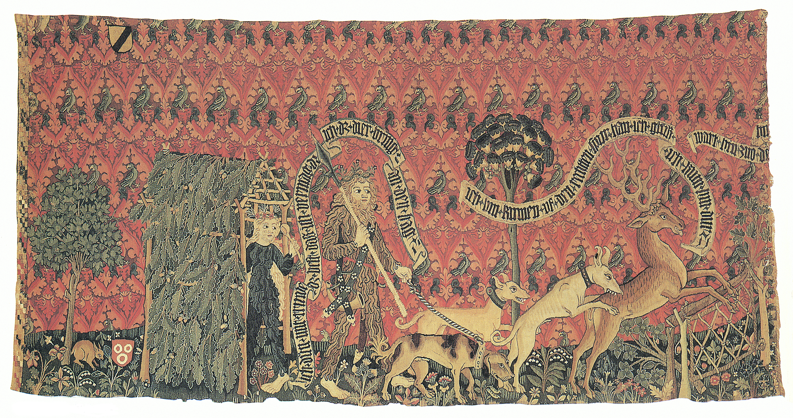 "Wilde Leute auf der Hirschjagd", Wandbehang, Linker Teil, "Wild people on deer hunt", Left Part, Basel, 123-128,5cm x 253cm